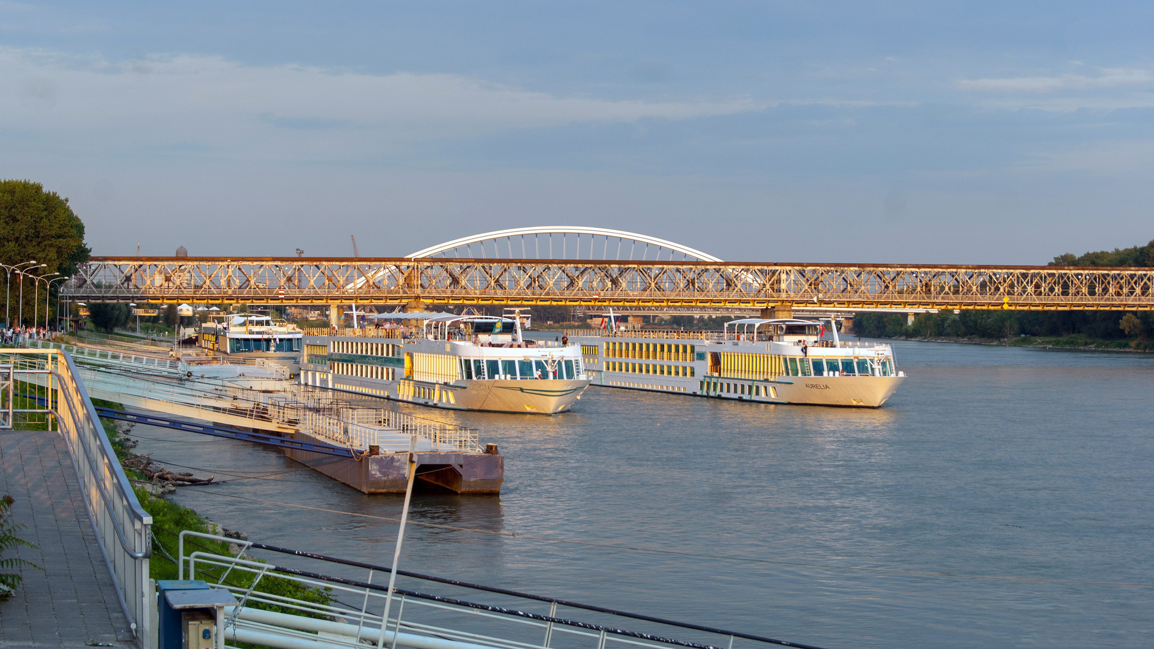 Die Schwesterschiffe Rousse Prestige und Aurelia an der Alten Brücke (Starý most) in Bratislava.